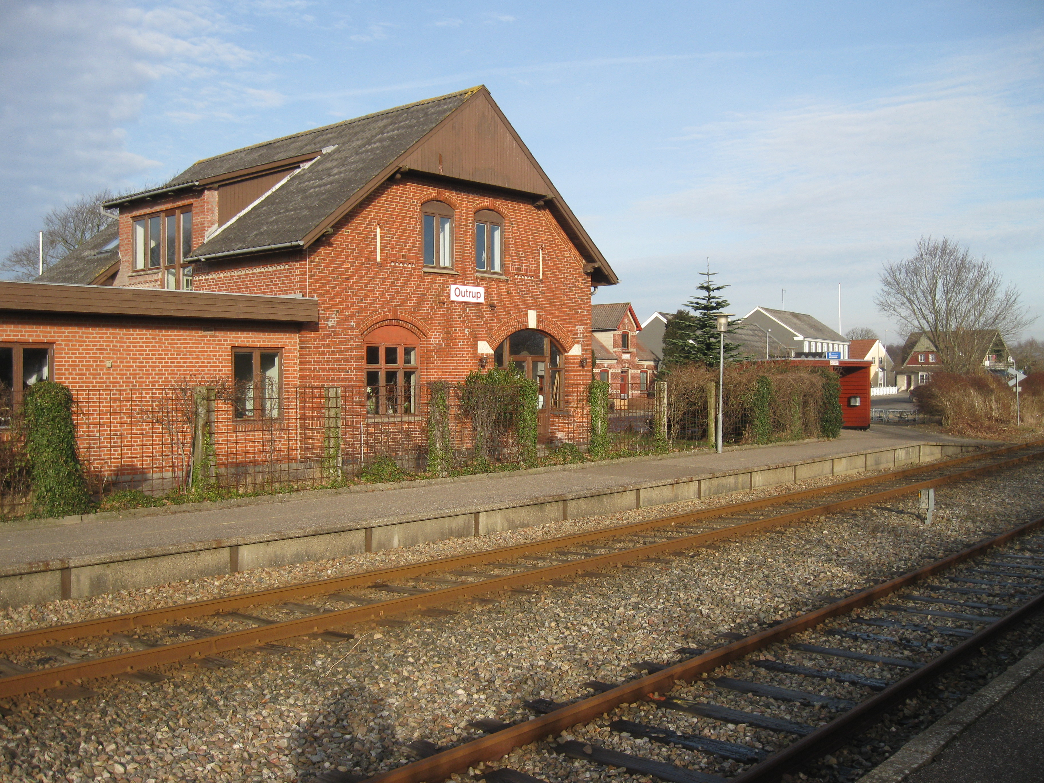 Outrup Station på Vestbanen